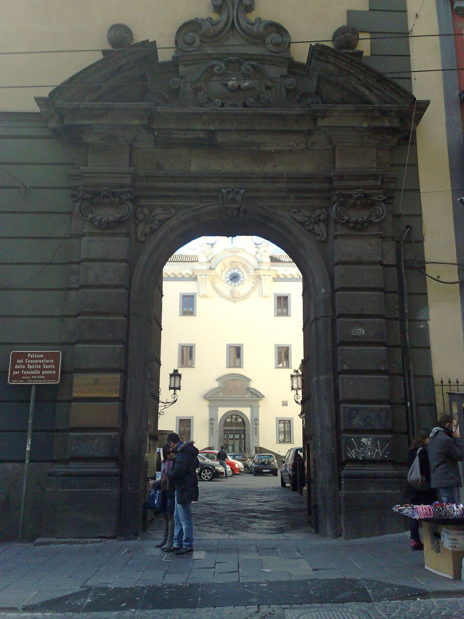 portone del conservatorio dello spirito santo (Napoli).